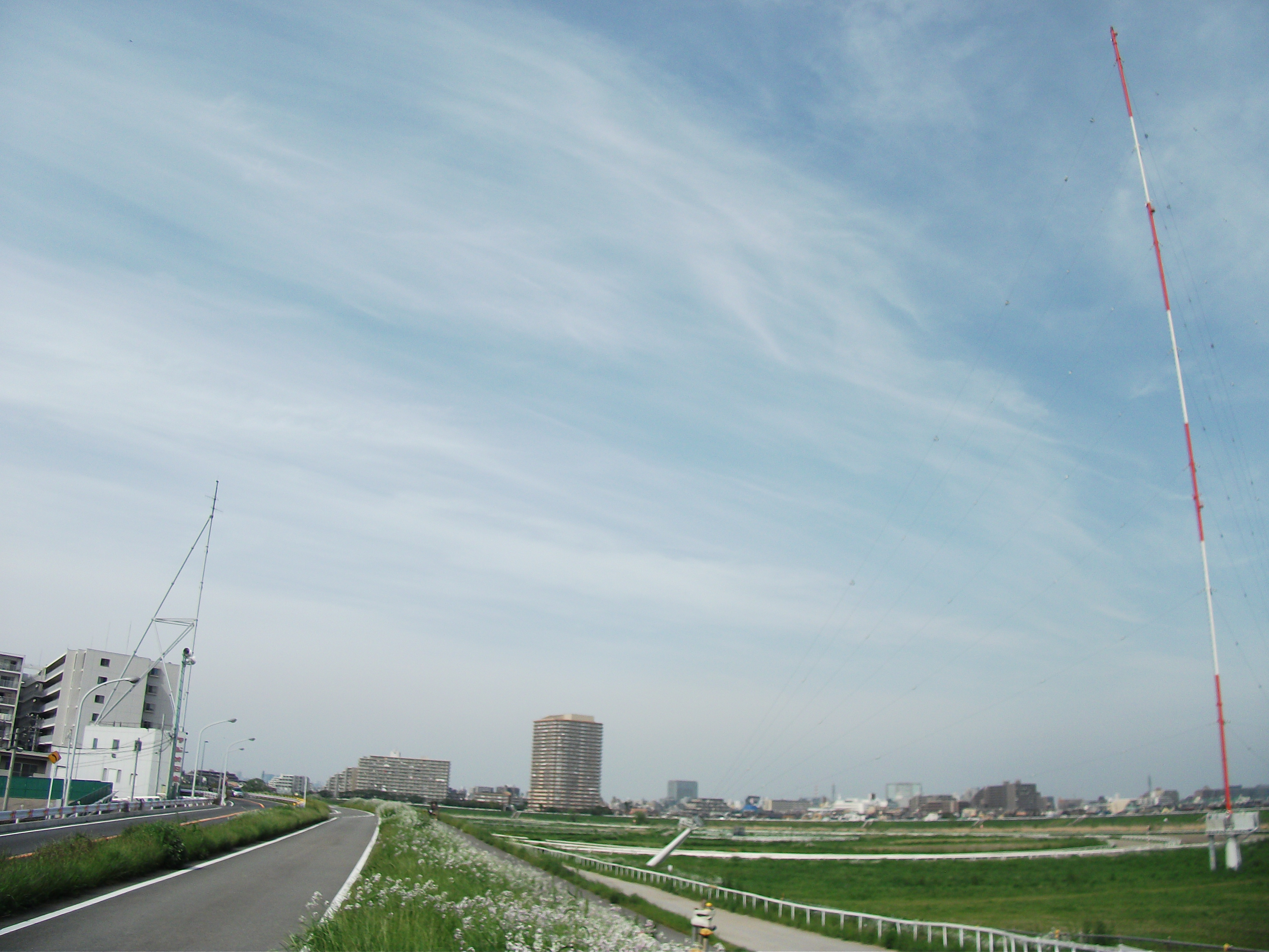 アール・エフ・ラジオ日本 川崎幸放送局 空中線と局舎